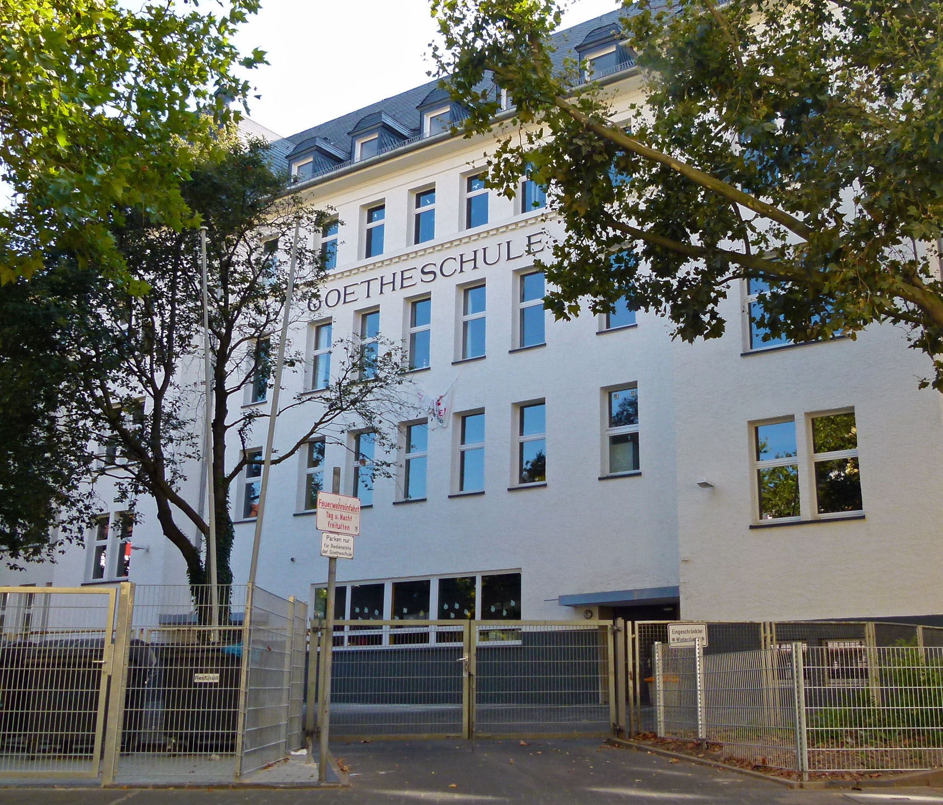 Offenbach am Main, Kernstadt, Bernardstrasse 70, Goetheschule